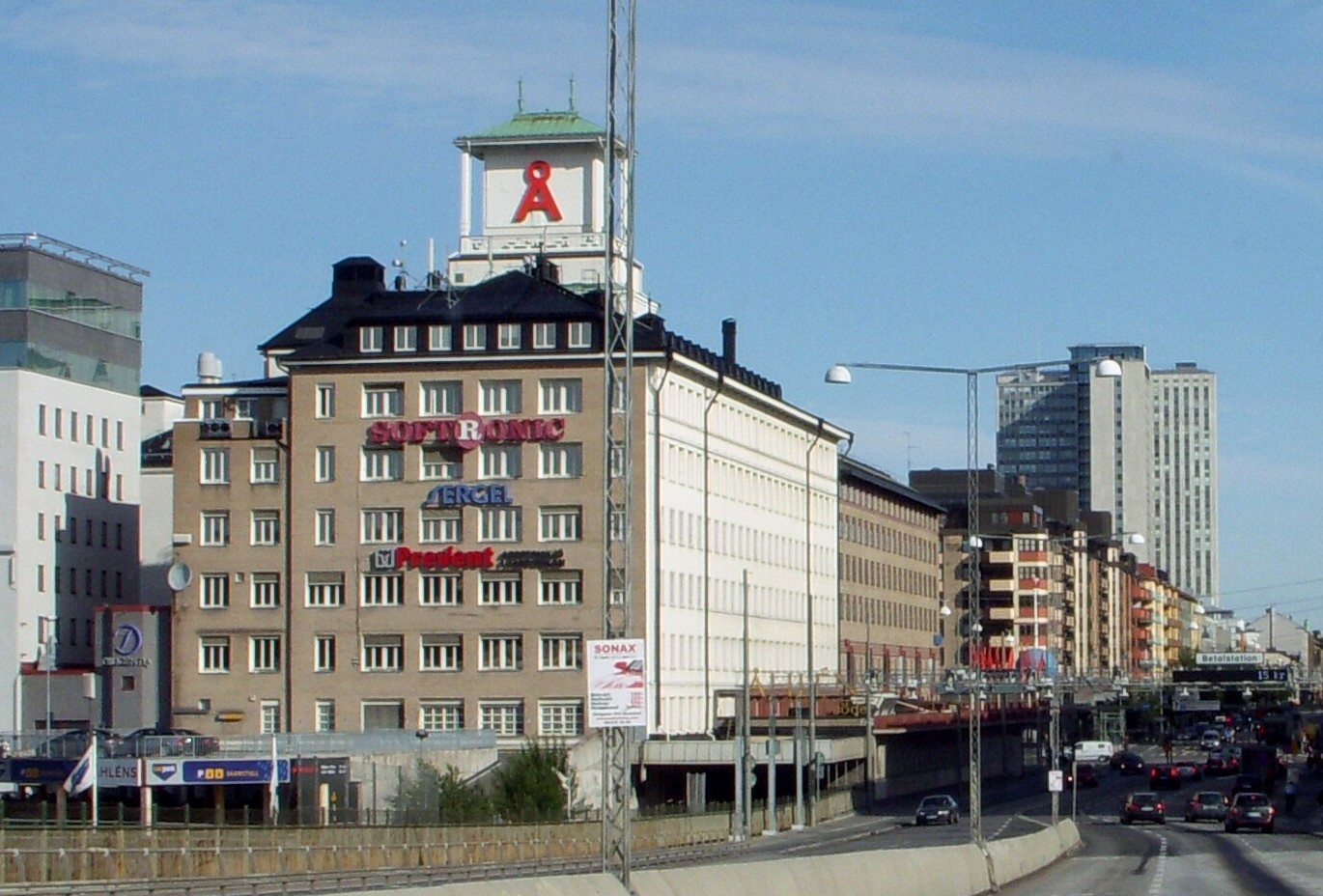 Åhléns på Södermalm, vy från Skanstullsbron mot norr